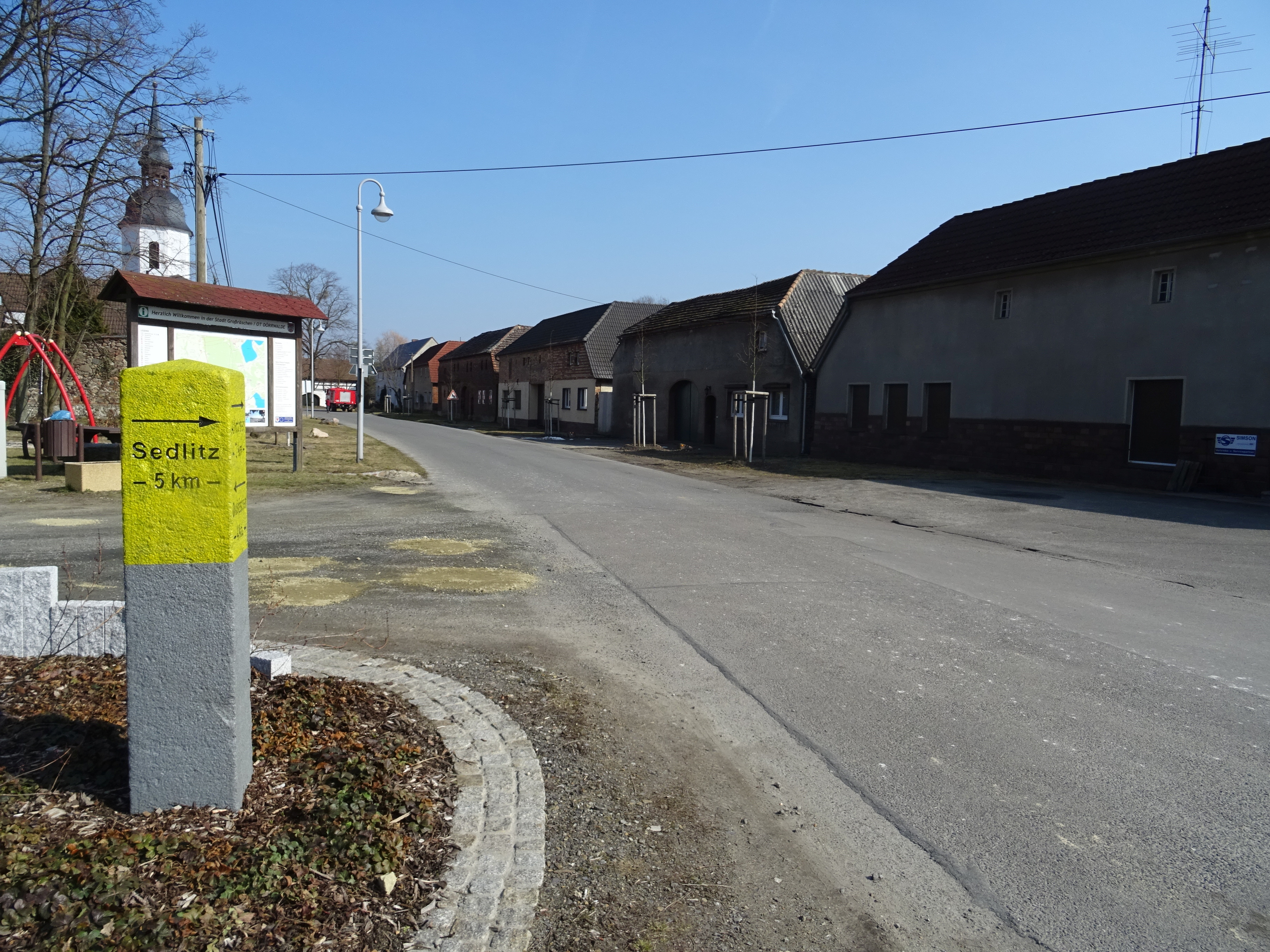 Dörrwalde,Lindenstraße mit charakteristischen Wohnbauten